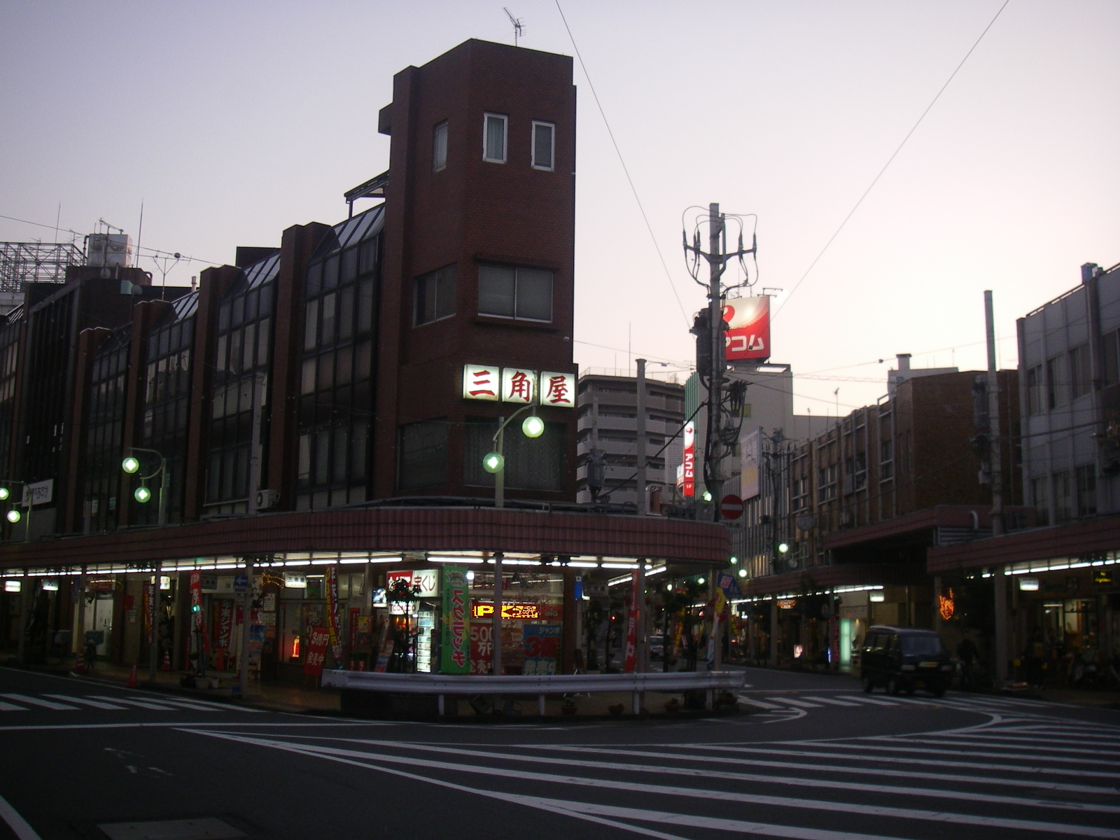 三角屋